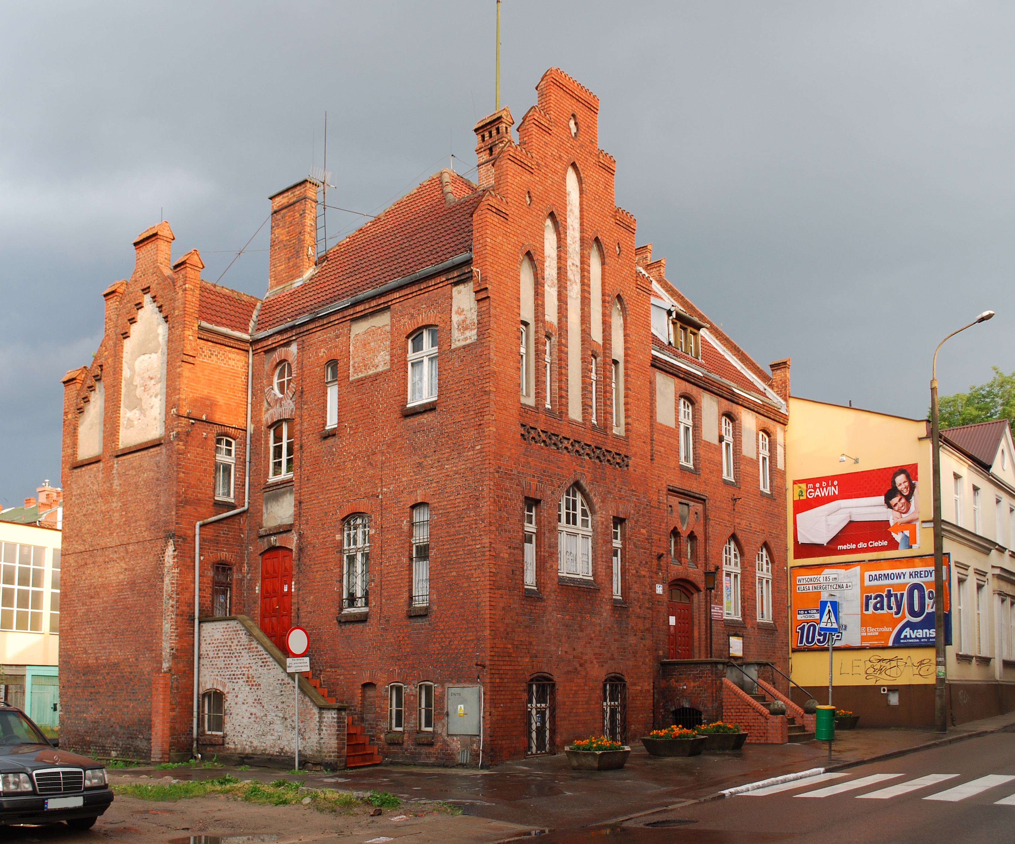 Starogard Gdański, ul. Jana III Sobieskiego 14 - Miejska Biblioteka Publiczna im. ks. Bernarda Sychty. (W latach 1926-1939 siedziba kasyna oficerskiego 2. pułku Szwoleżerów Rokitniańskich.))